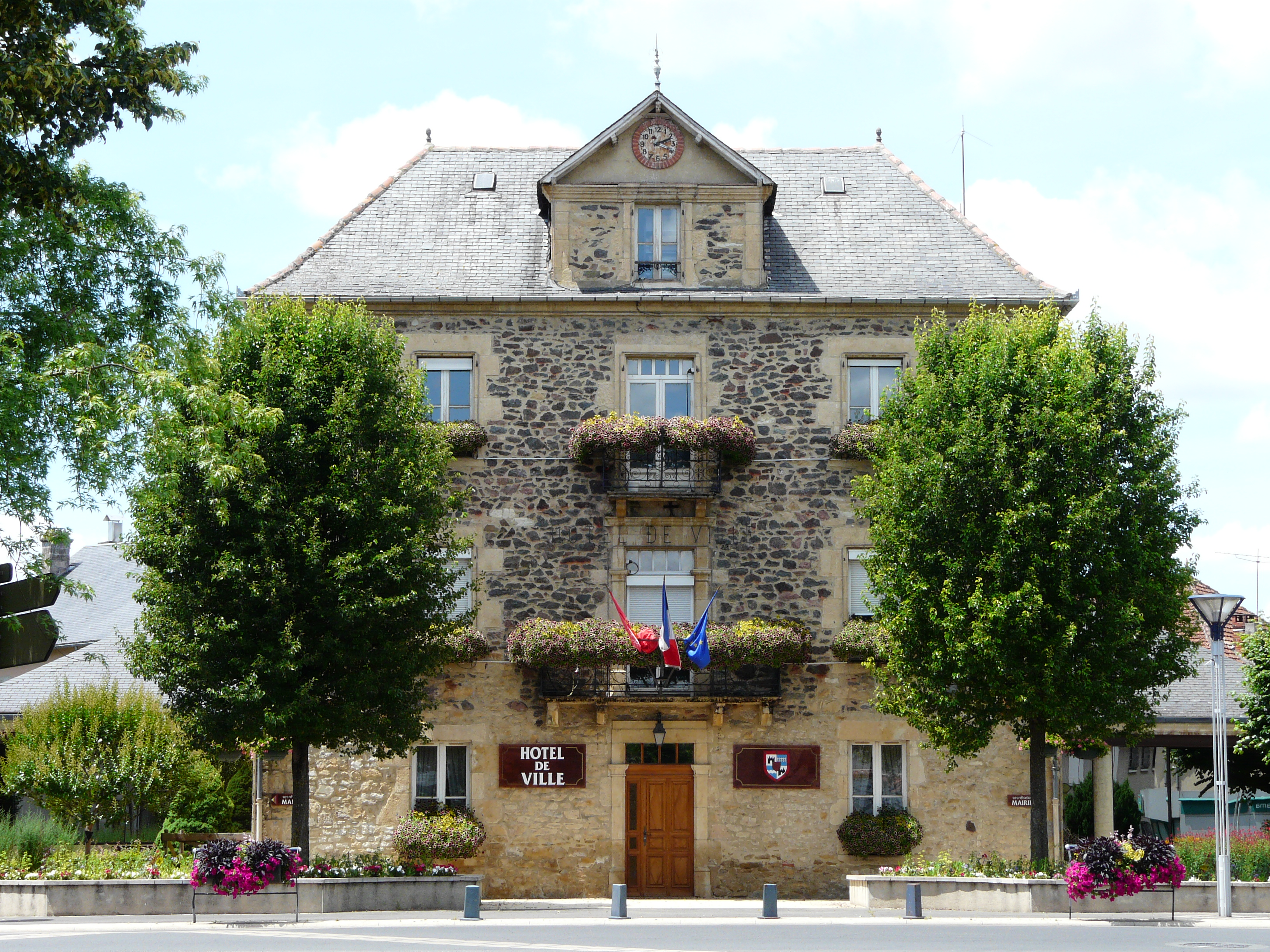 La mairie de Biars-sur-Cère, Lot, France.